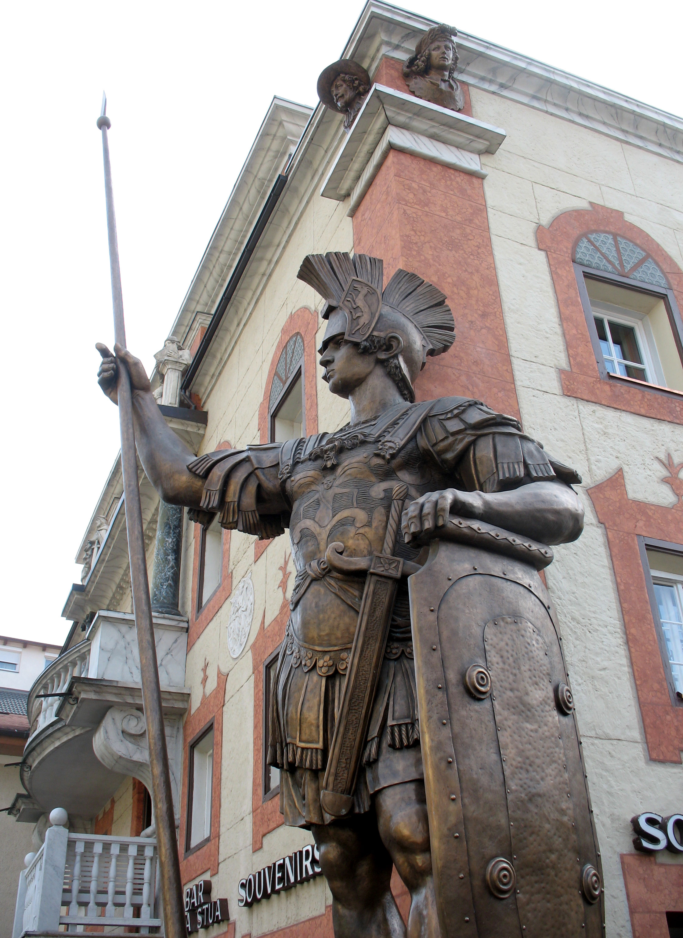 Sculpture by Johann Baptist Moroder-Lusenberg (1870 – 1932) in St. Ulrich in Gröden - Ortisei Val Gardena